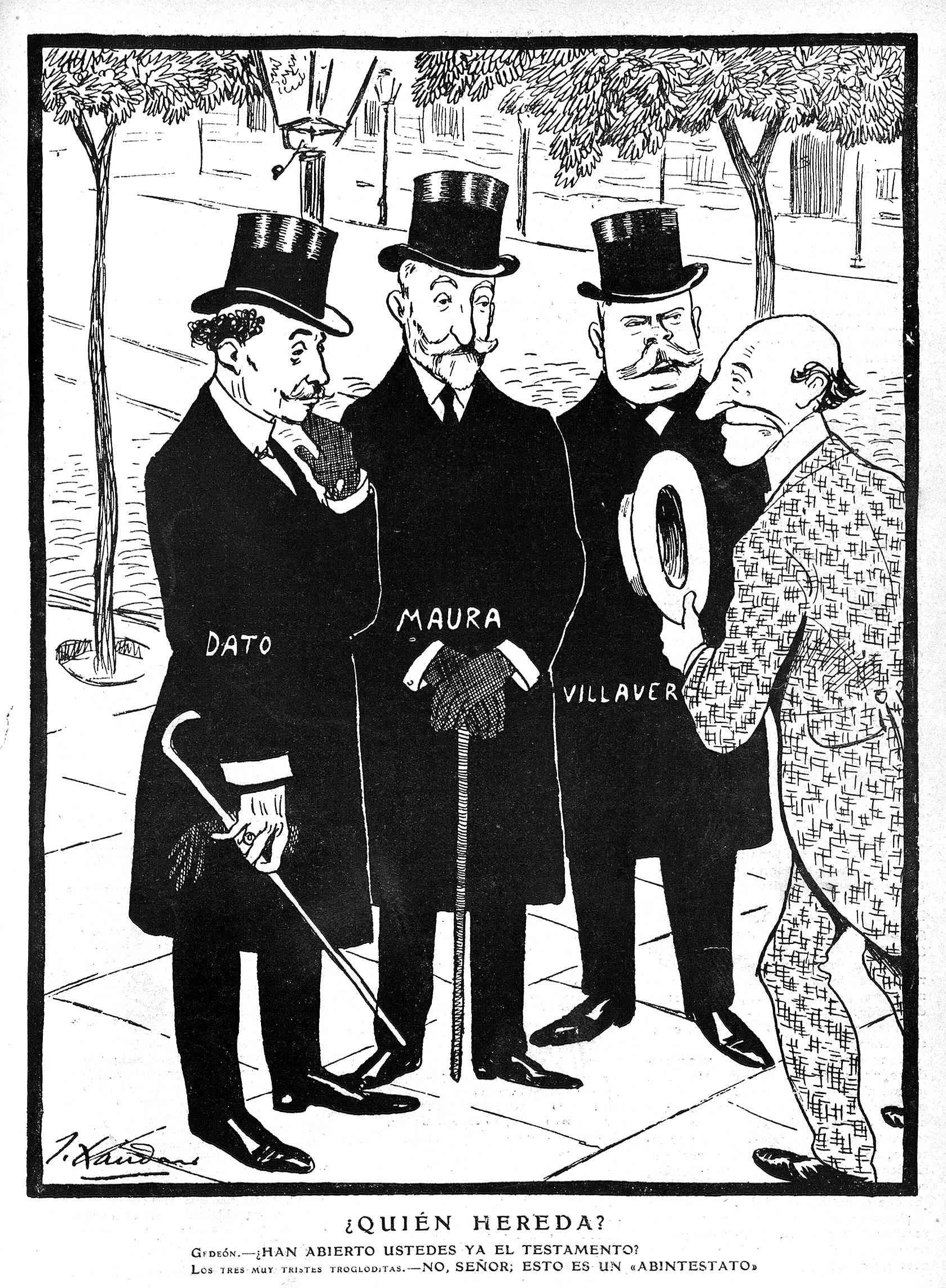 ¿Quién hereda?, en la revista satírica española Gedeón.